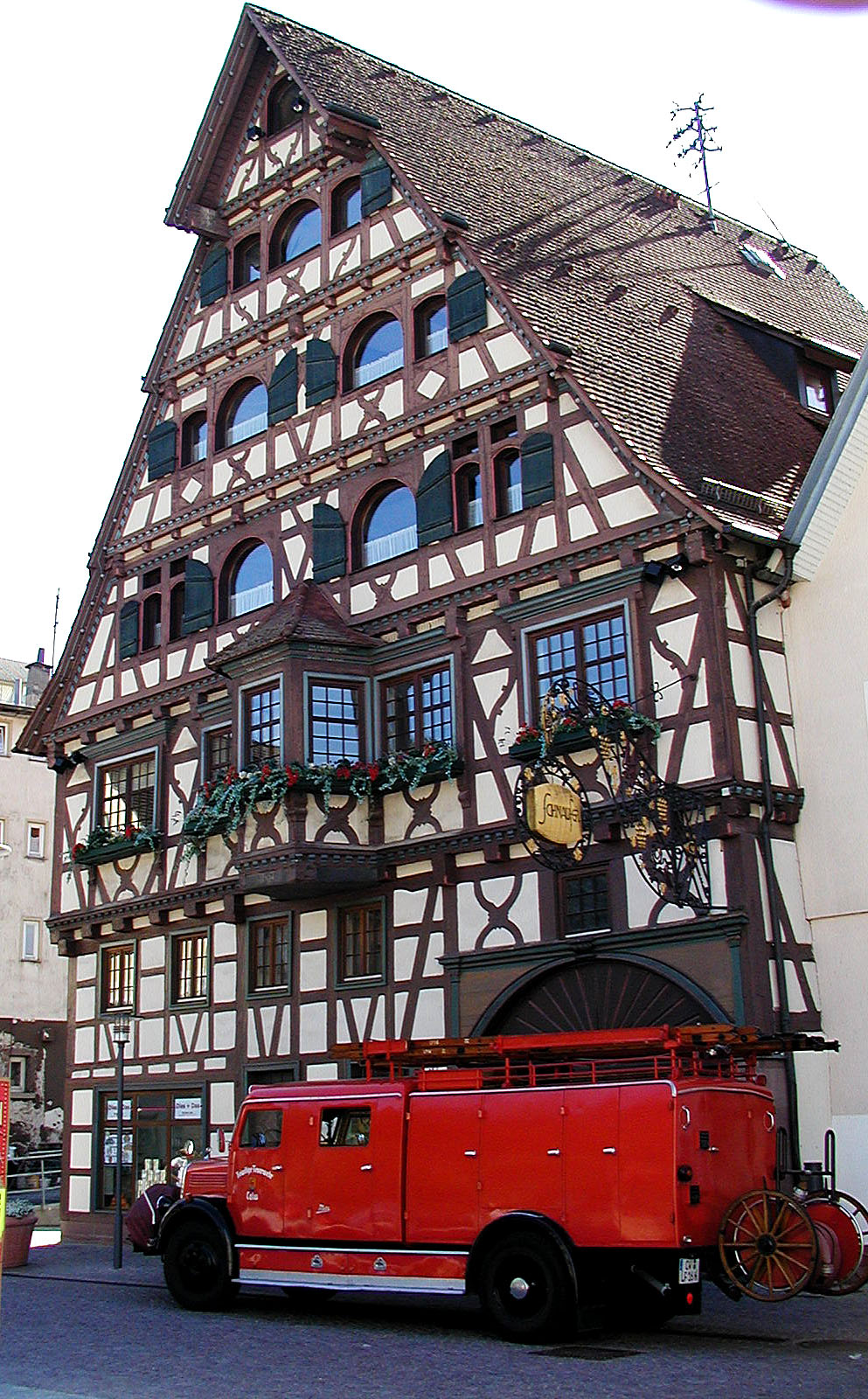 Schnauferhaus in Calw / Schnaufer House in Calw